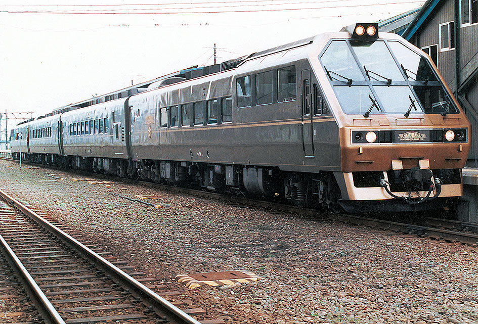 JR北海道 キハ59アルファコンチネンタルエクスプレス「JTBパノラマエクスプレス」